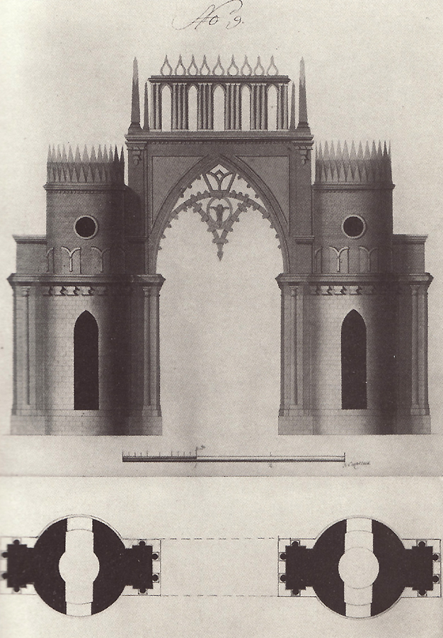 Чертёж Фигурных ворот (Царицыно).